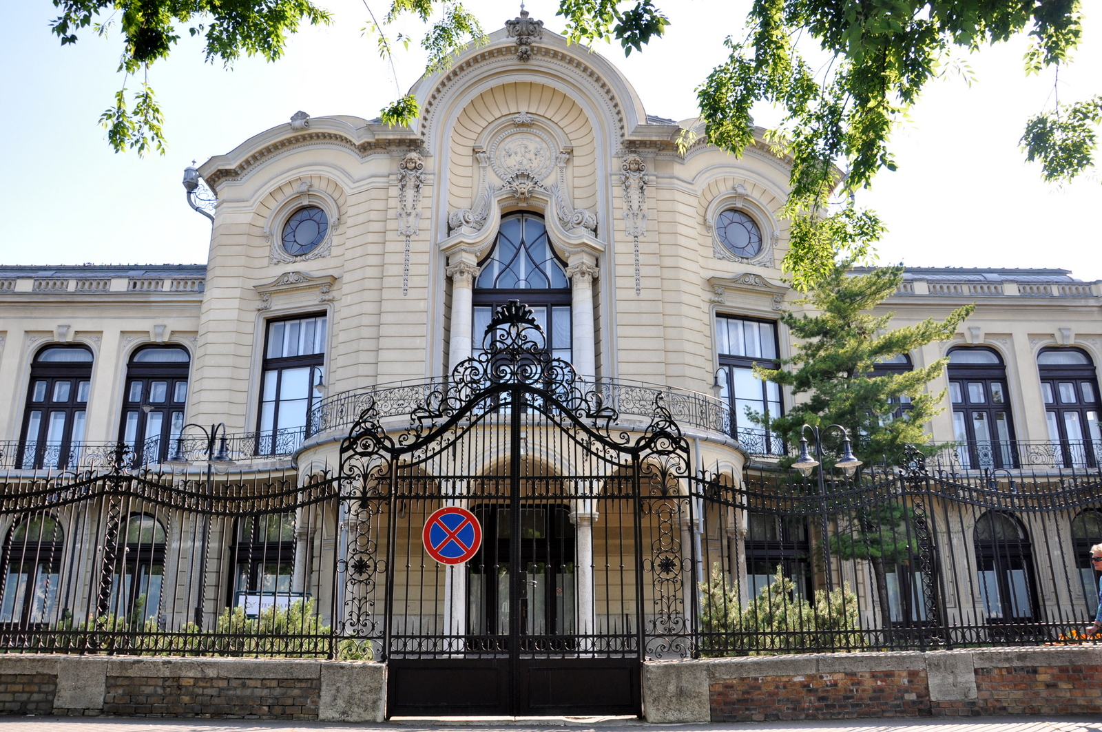 Stefánia Palace